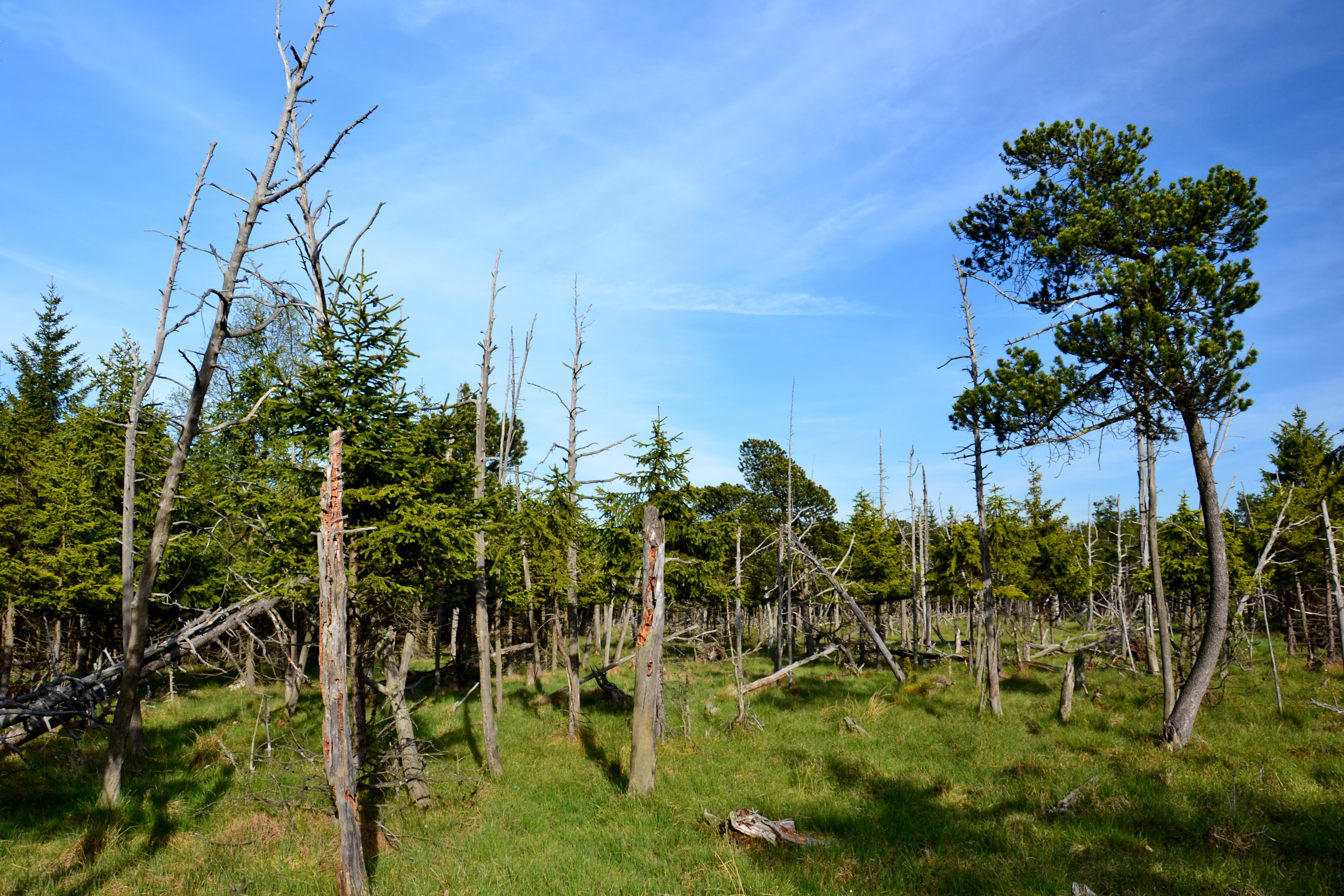 Severní část rašeliniště s borovicí blatkou